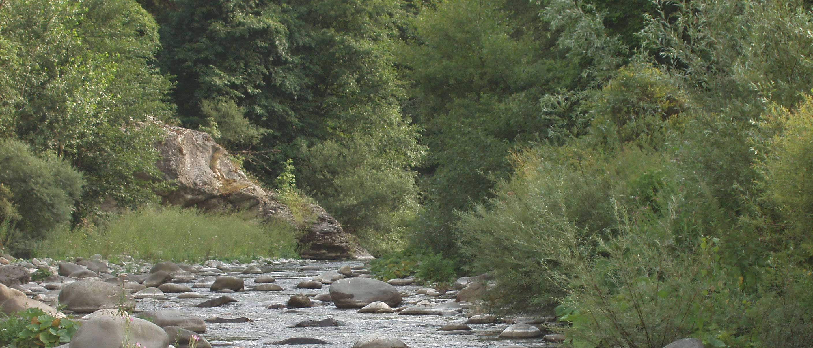 Autore Utente:Kronos, fonte fotocamera, descrizione: Alto corso del fiume Enza. Note: scatto risalente all'estate 2007.